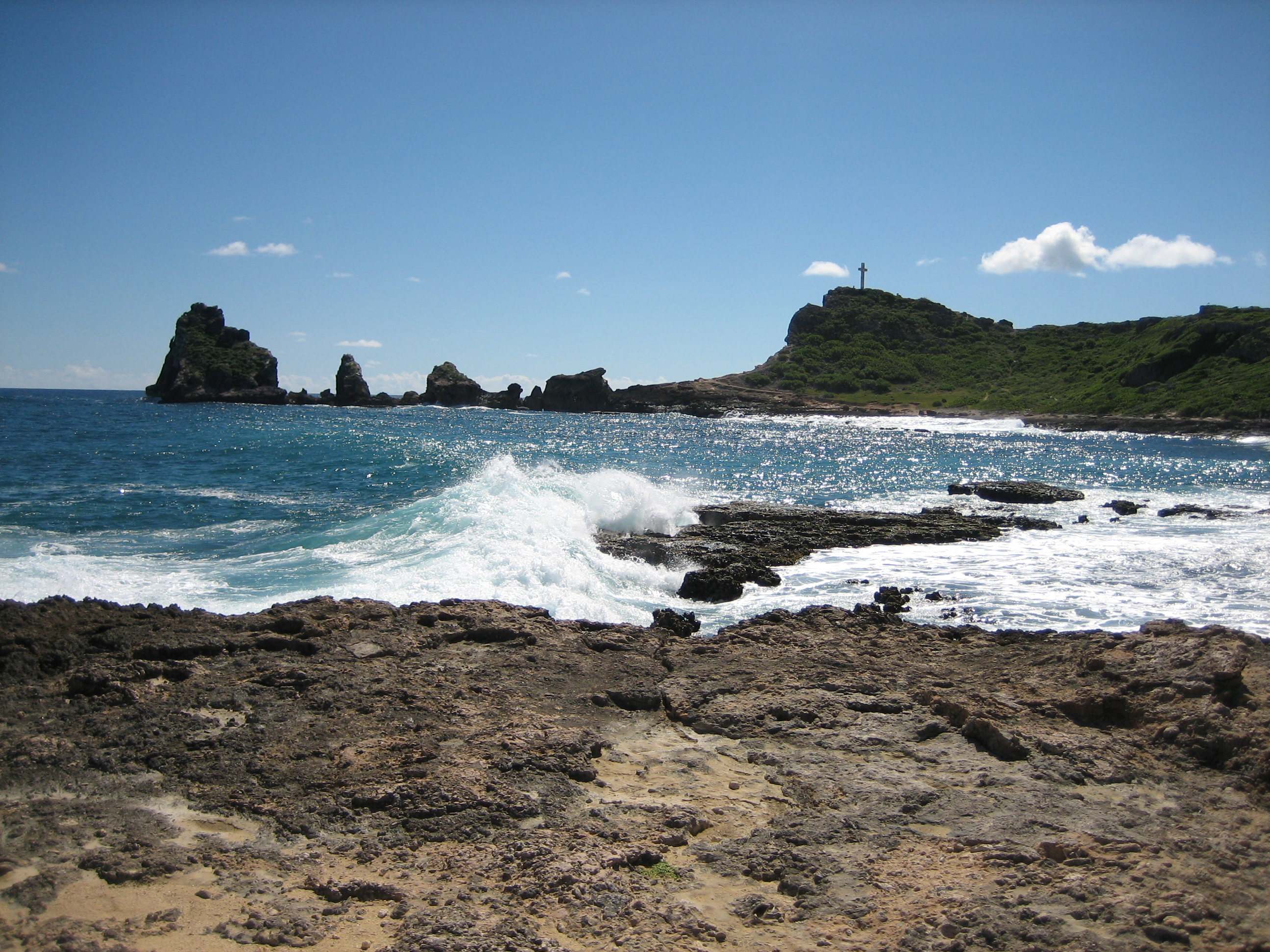 Pointe des chateaux, guadeloupe